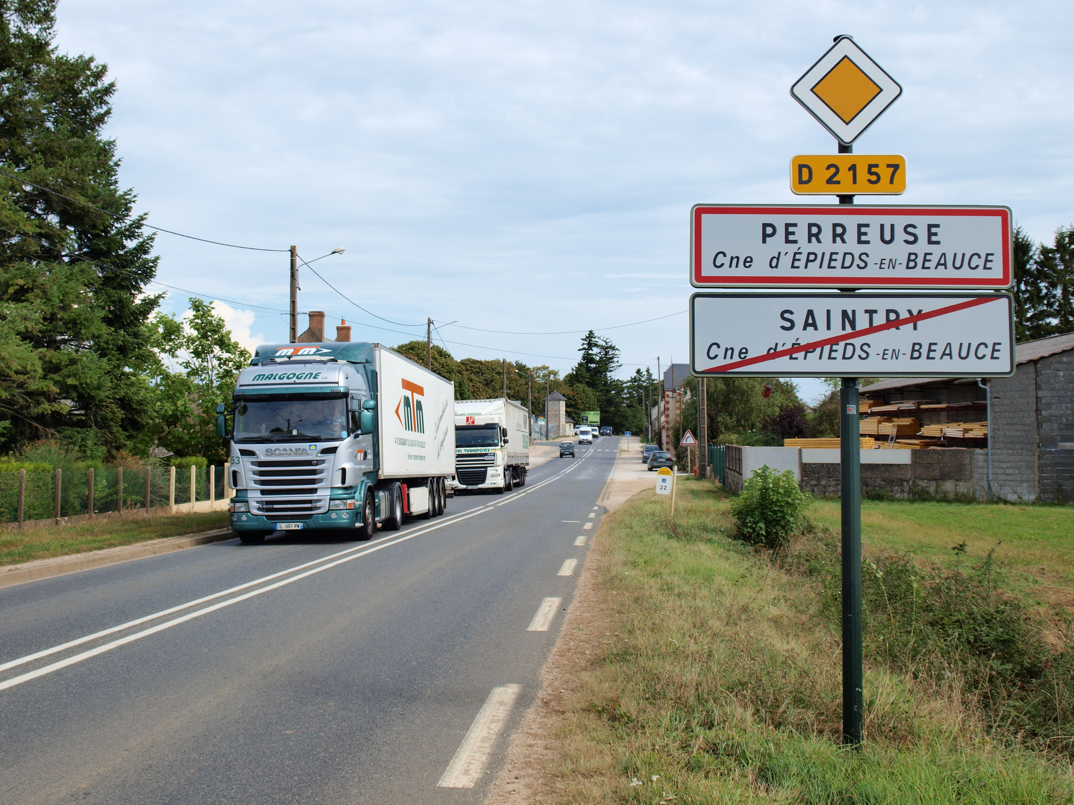 Épieds-en-Beauce (Loiret, France) ; sur la route entre Orléans & Le Mans (D 2157) : les hameaux de Saintry & de Perreuse.